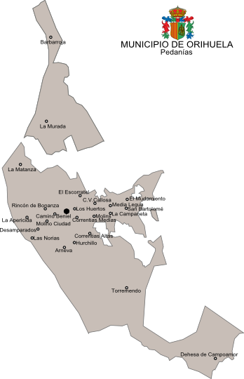 Plano con las pedanías de Orihuela. Subido en .png para poder poner el escudo y quitar la mancha negra de aquí: .